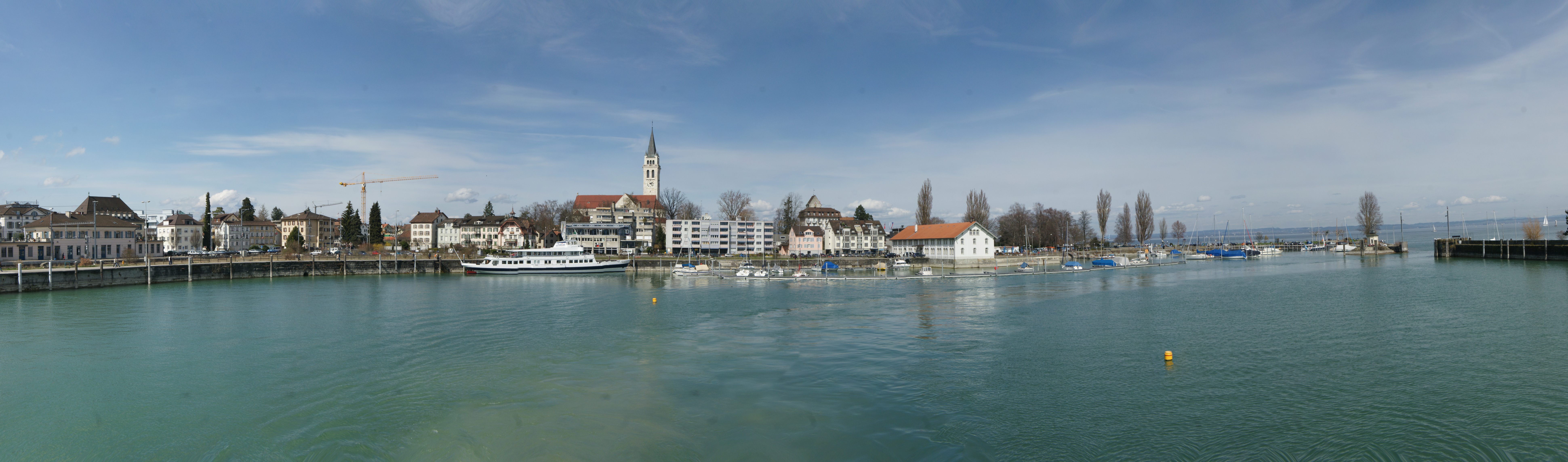 Hafenpanorama von Romanshorn.